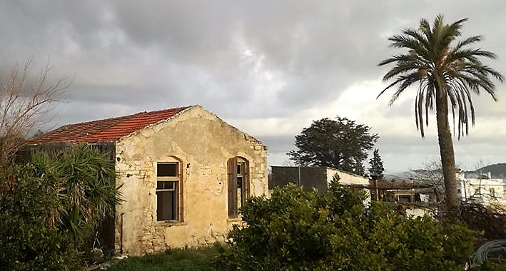 Δημοτικό Σχολείο Πασαλιτών. Έτος κατασκευής 1931